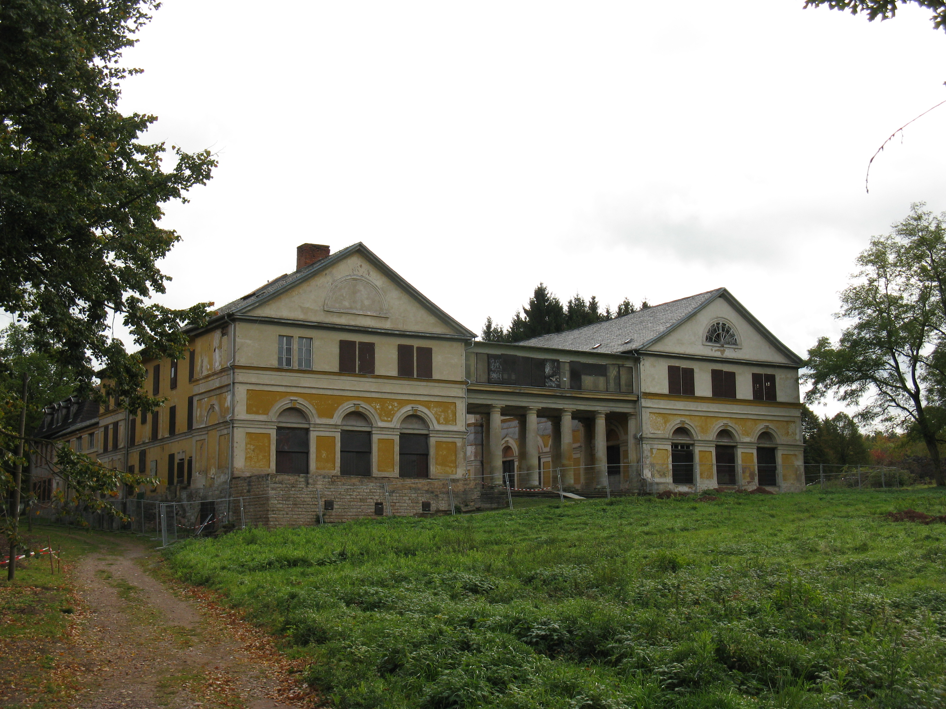 Schloß Wilhelmsthal bei Wilhelmsthal (Marksuhl, Thüringen)